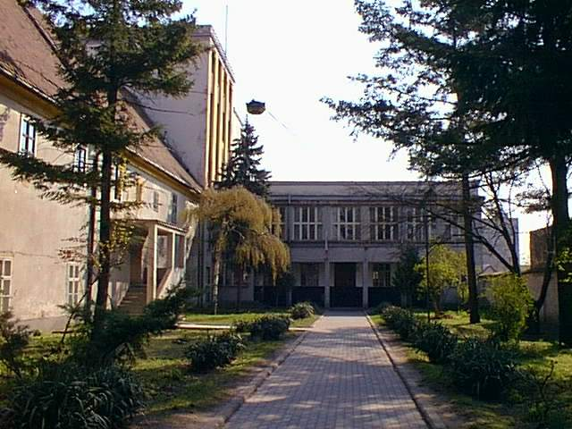 Spojená škola, vchod